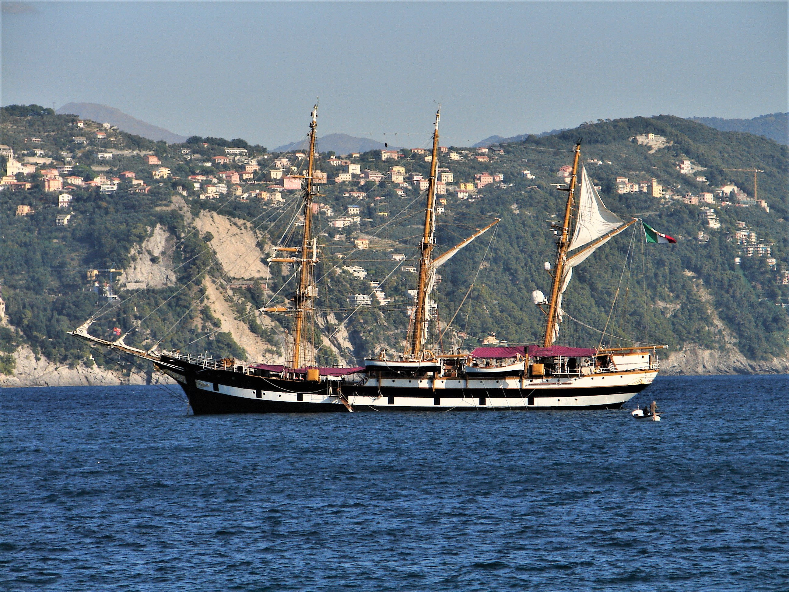 La nave scuola Palinuro nella rada di Santa Margherita Ligure il 14/10/2011